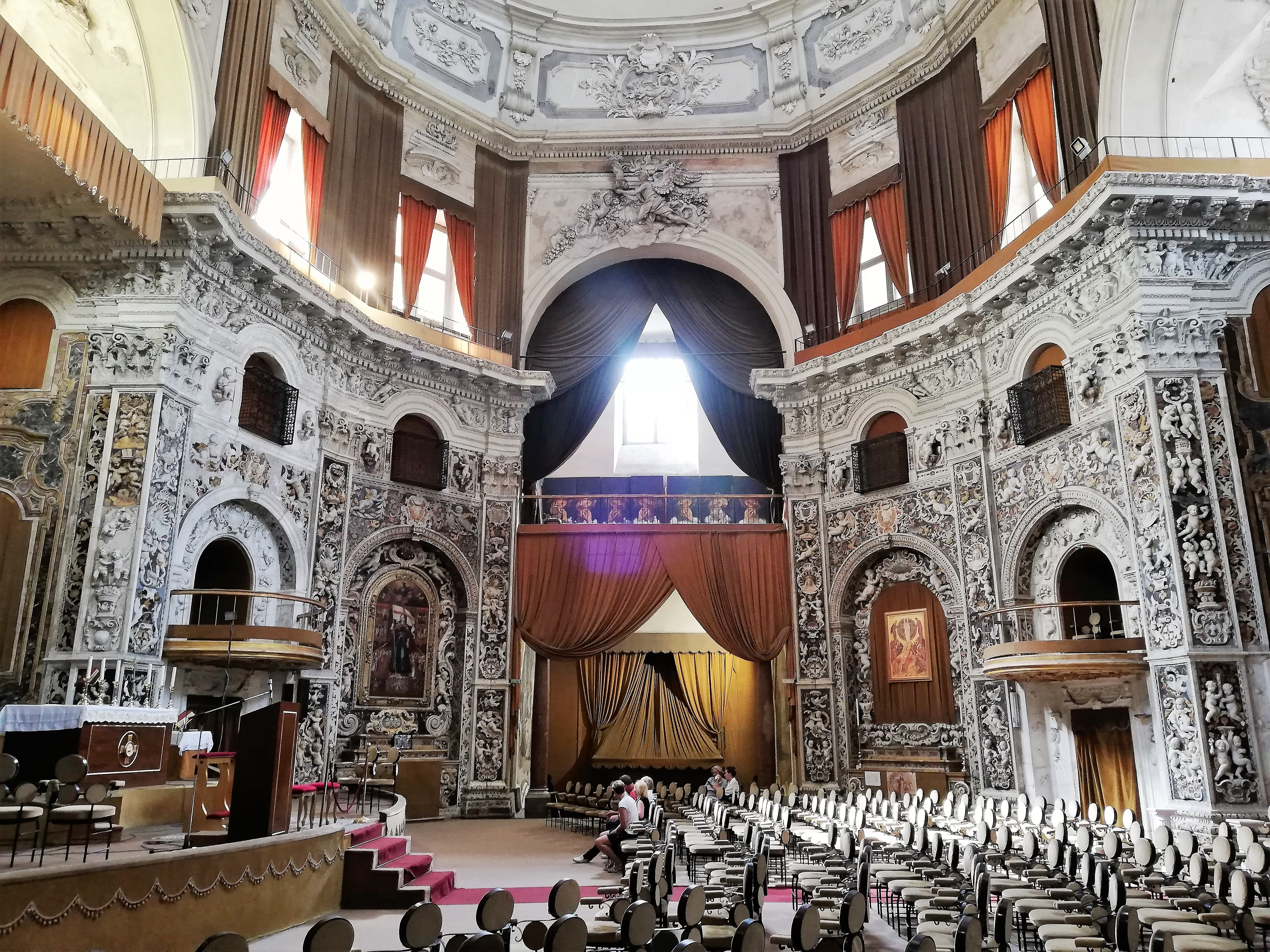 Ingresso a settentrione.